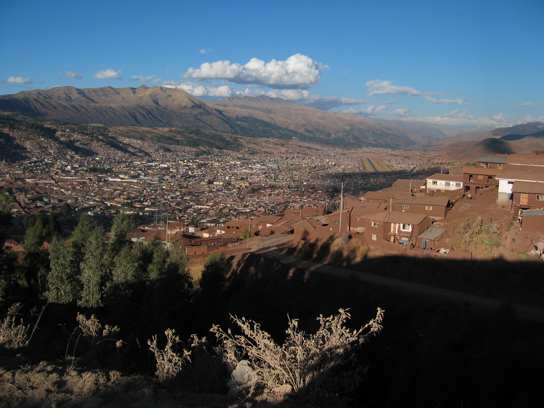 Cusco Peru 2003